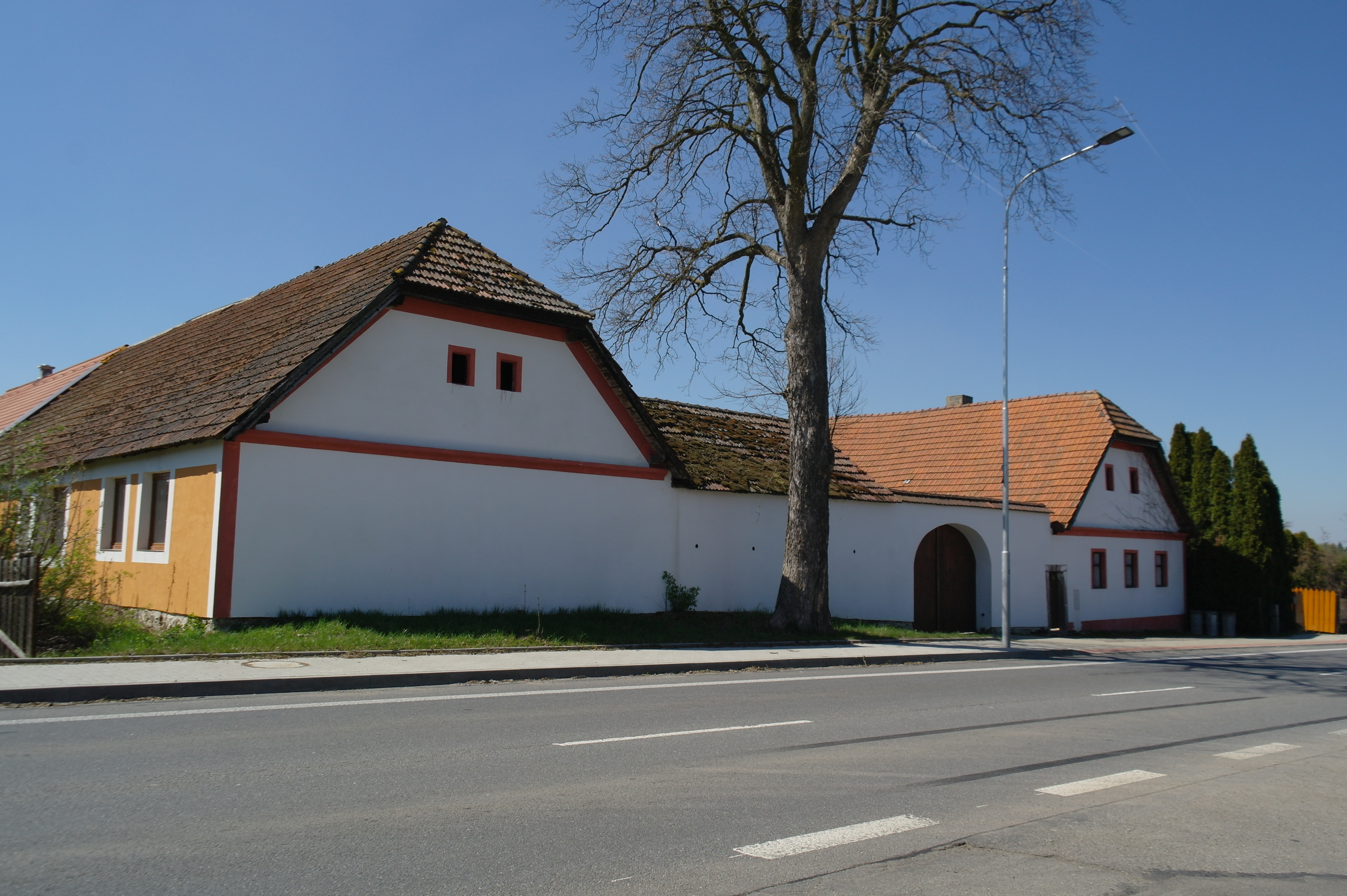 Všechov, statek čp. 16